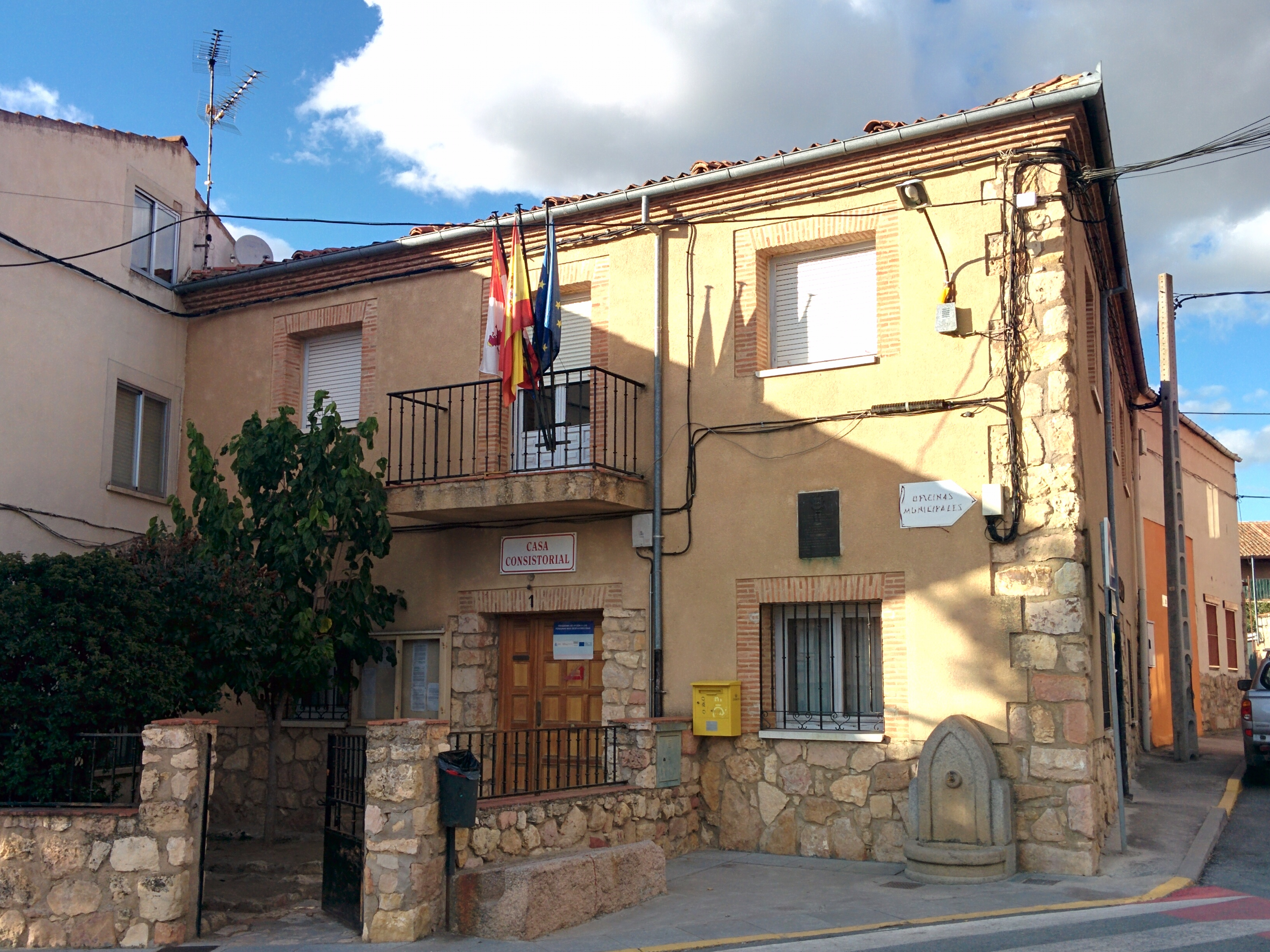 Casa consistorial de Espirdo (Segovia, España).